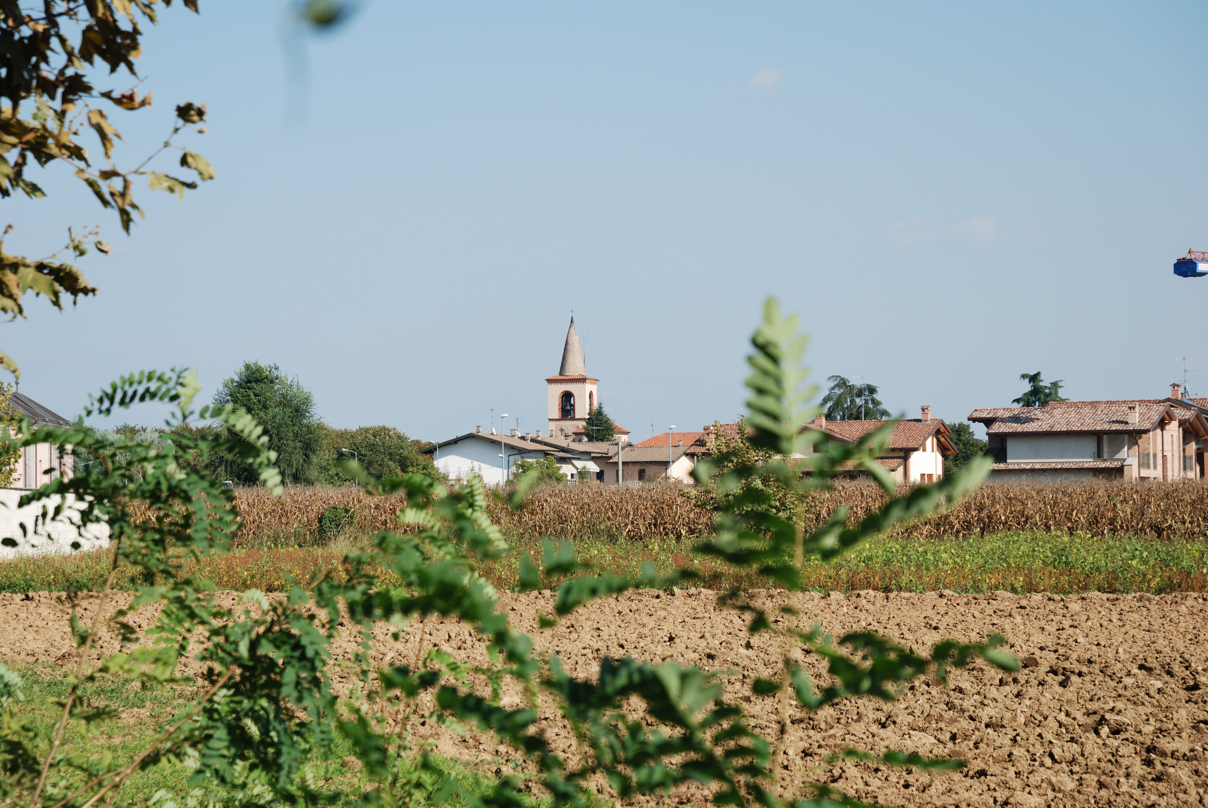 Urgnano, frazione Basella, provincia di Bergamo, Italia.